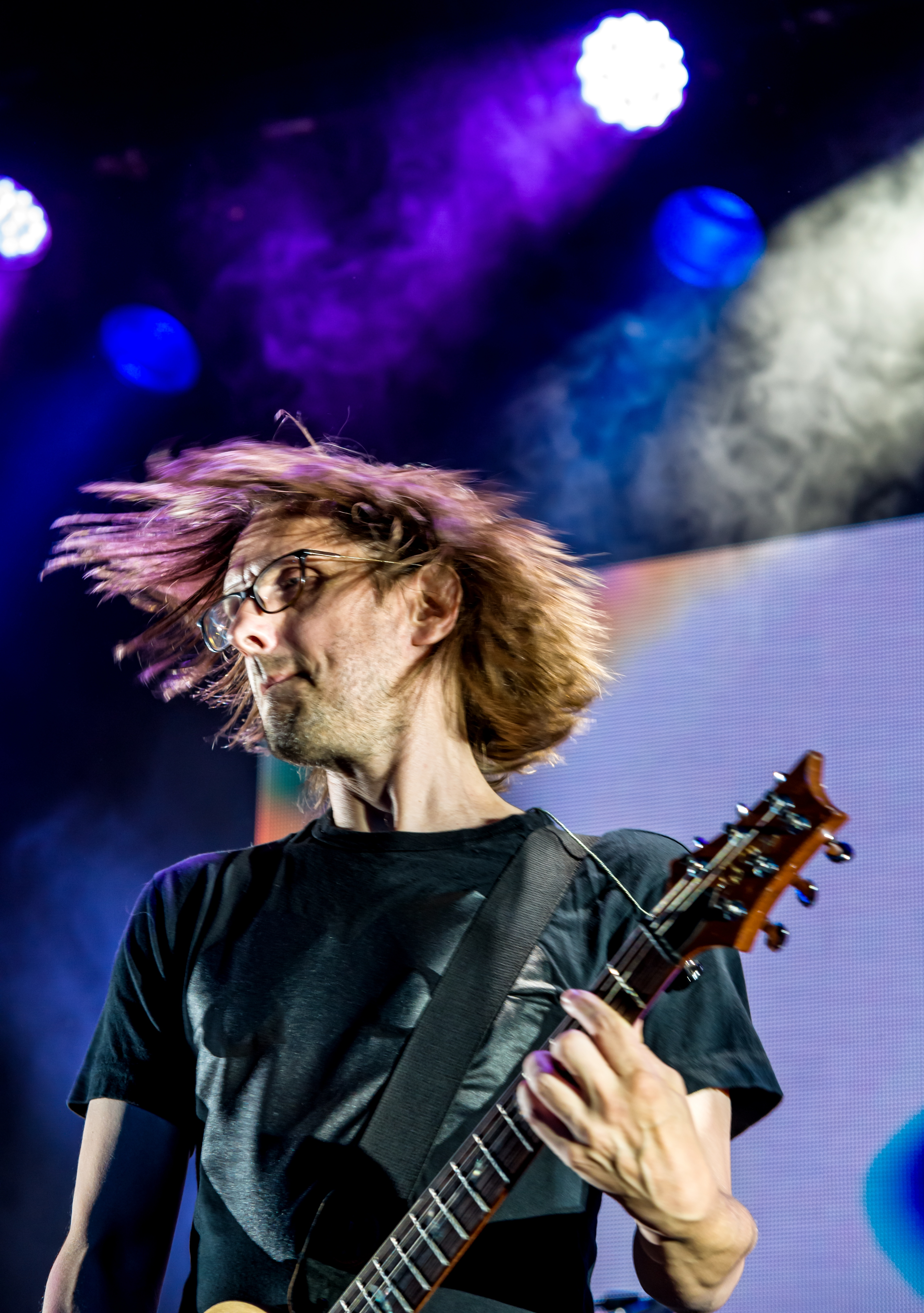 Bilder vom Zelt Musik Festival 2018 in Freiburg im Breisgau Das Eröffnungskonzert mit Steven Wilson